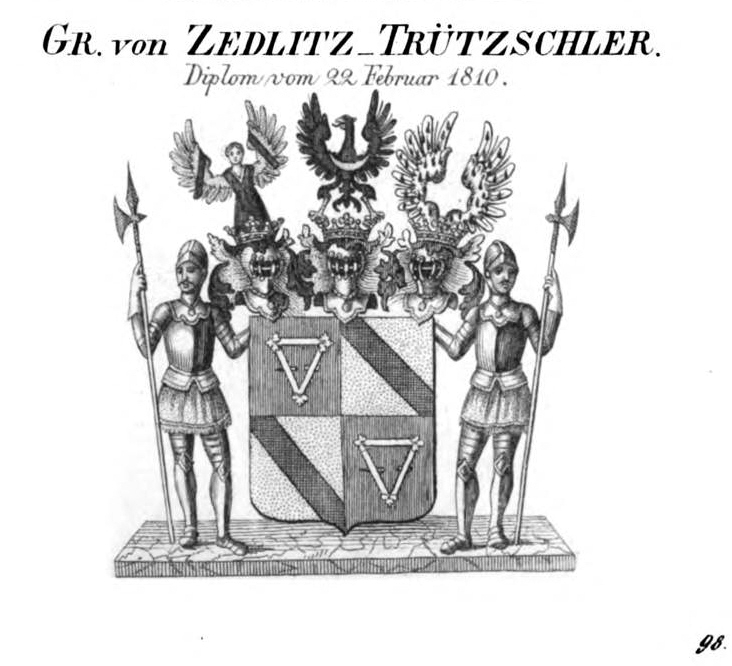 Wappen Zedlitz Trützschler - Tyroff HA.jpg